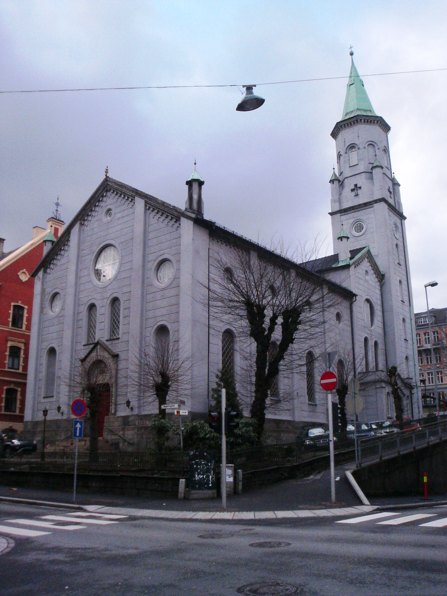 St. Paul kirke